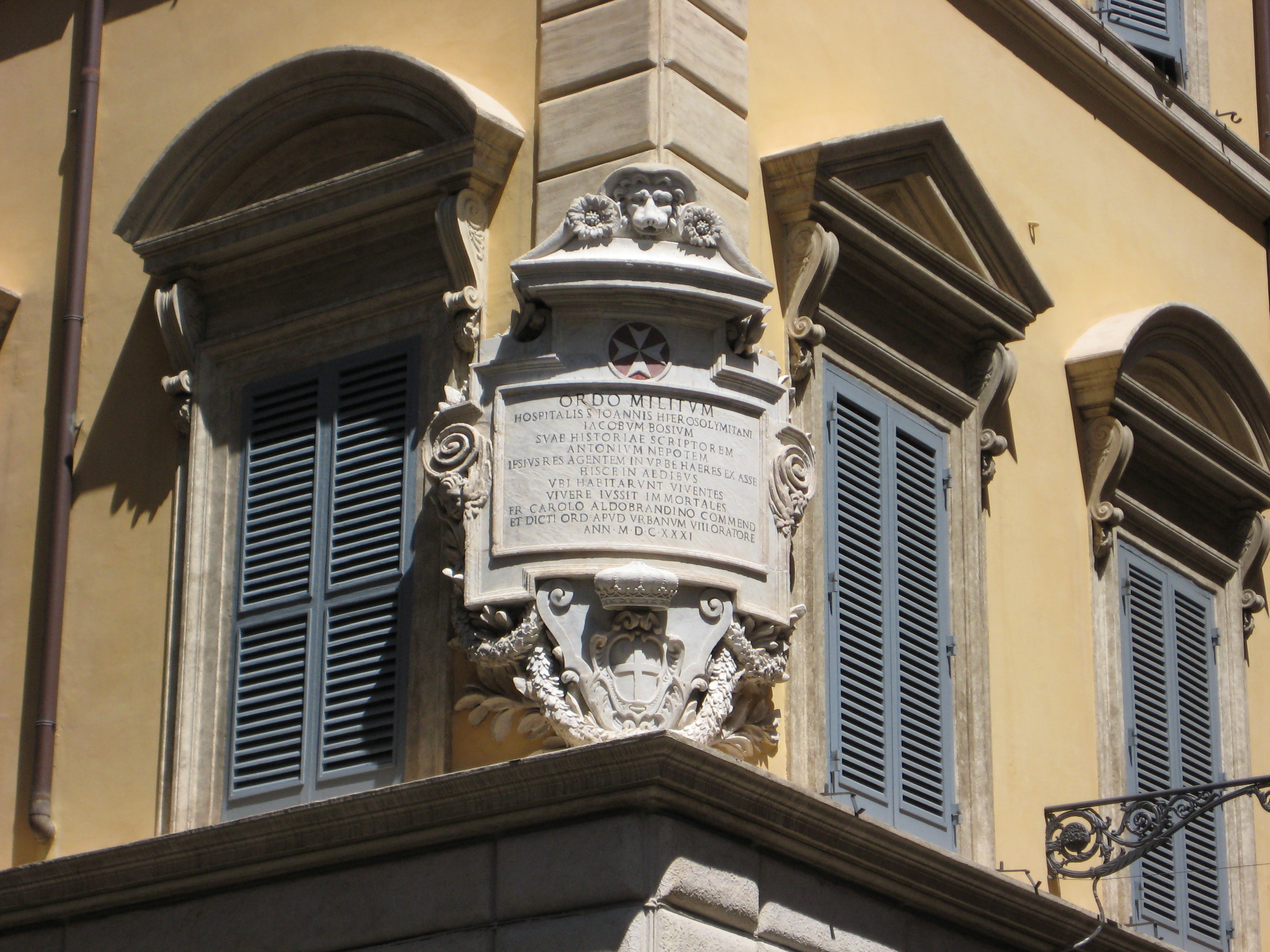 Magistralpalast, Via dei Condotti 68 in Rom, Sitz der Ordensregierung